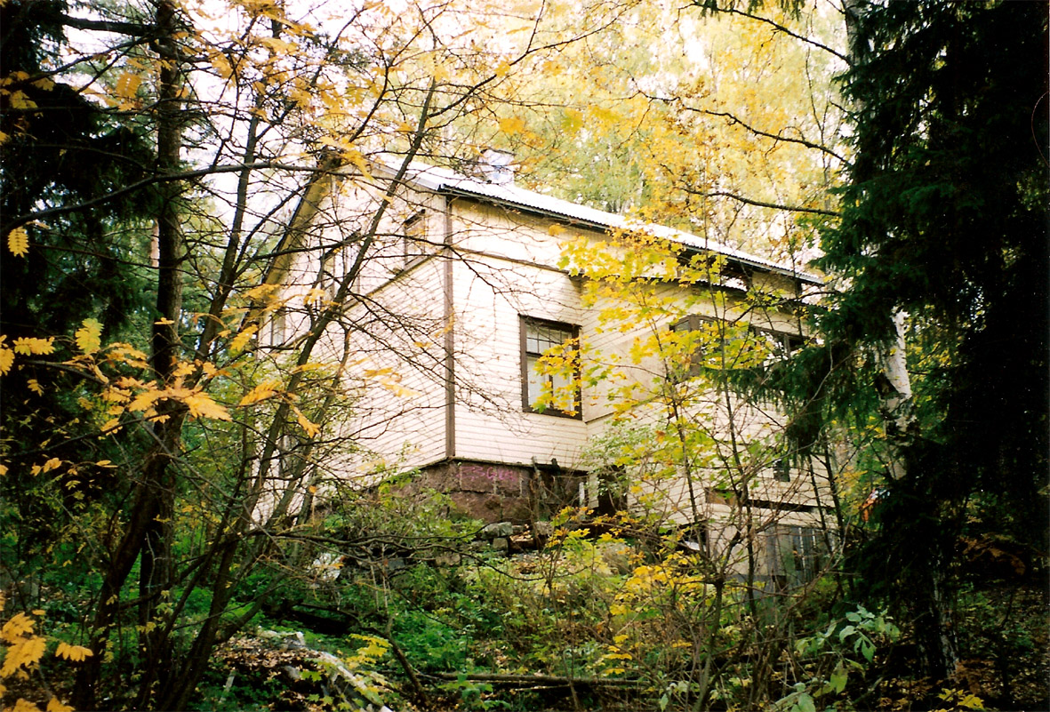 Siperia